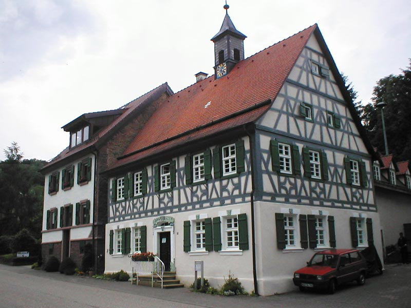 Rathaus von Obrigheim-Mörtelstein, erbaut 1801